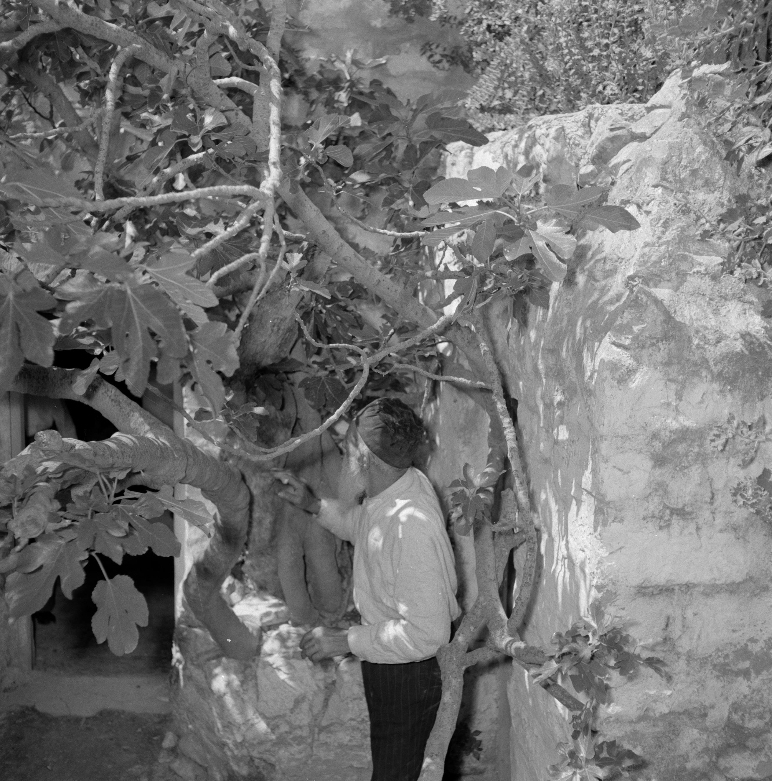 Collectie / Archief : Fotocollectie Van de Poll Reportage / Serie : [ onbekend ] Beschrijving : Safad (Safed). Rabbi Jozef van Bennea bij een oude vijgenboom Datum : ongedateerd Locatie : Israël, Safad, Safed Trefwoorden : bomen, rabbijnen, vijgebomen Fotograaf : Poll, Willem van de Auteursrechthebbende : Nationaal Archief Materiaalsoort : Negatief (zwart/wit) Nummer archiefinventaris : bekijk toegang 2.24.14.02 Bestanddeelnummer : 255-4026